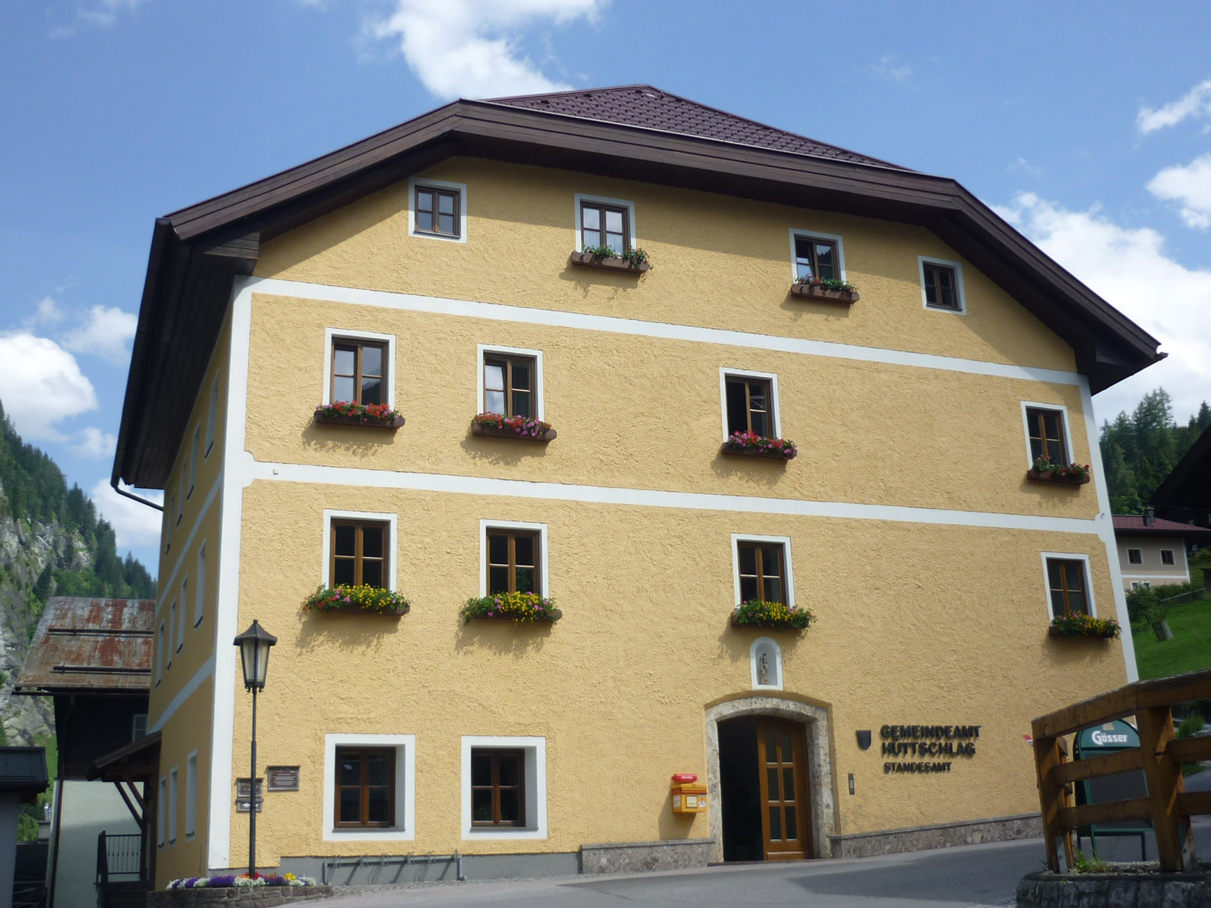 Gemeindeamt Hüttschlag, ehemaliges Bergwerksverweserhaus (1686)